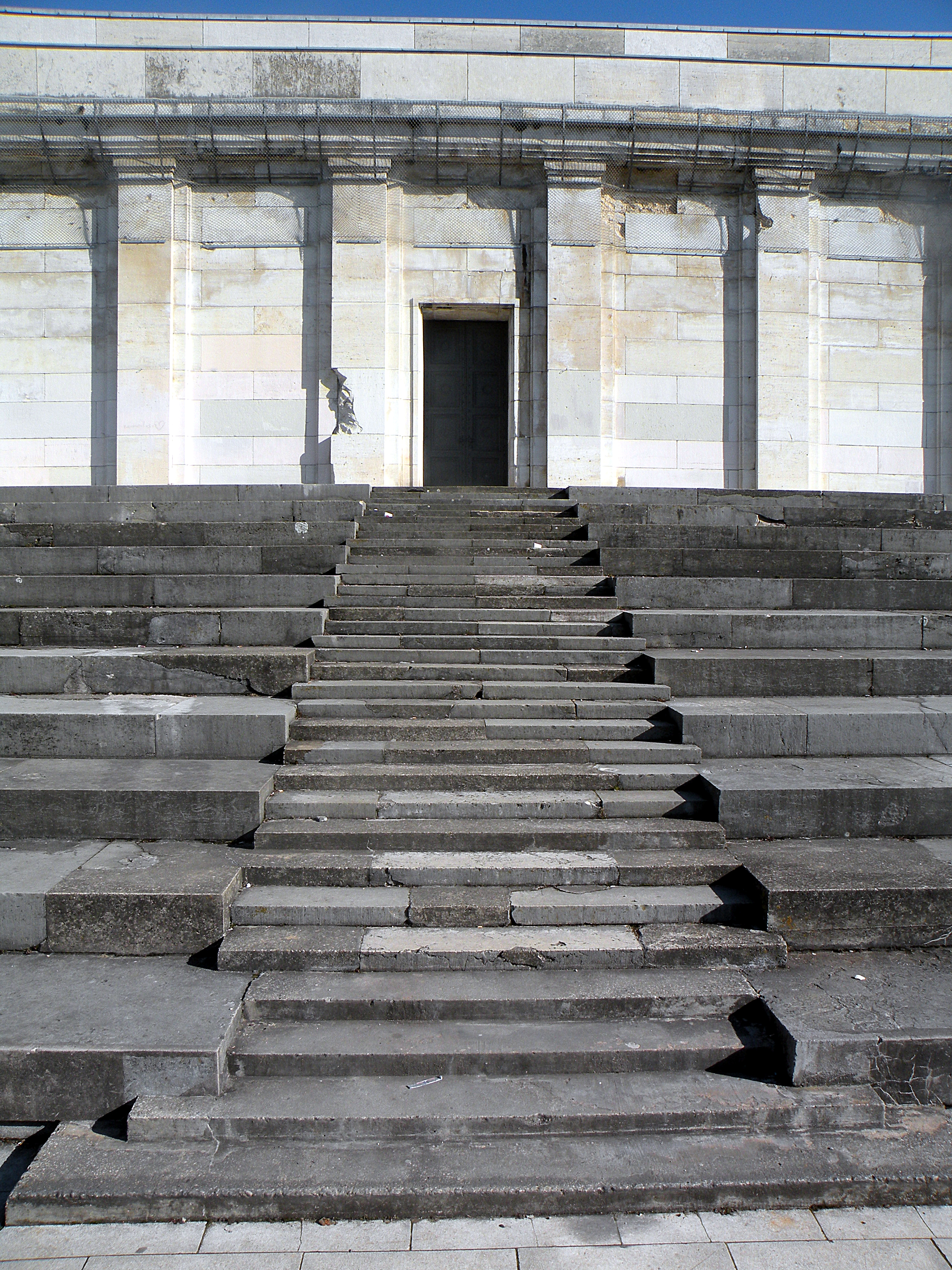 Выход из "Золотого зала".